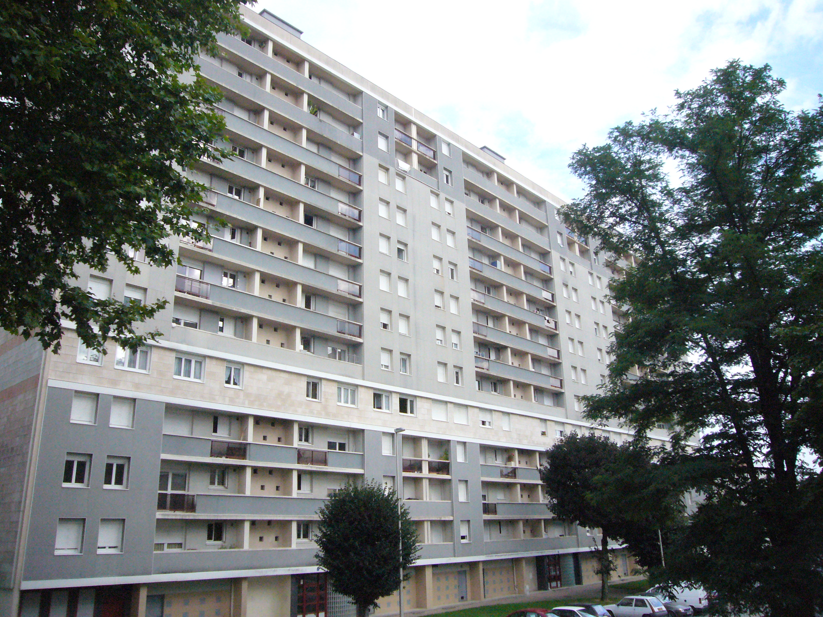 Barre d'immeuble de la cité du Sablard, à Limoges (Haute-Vienne)